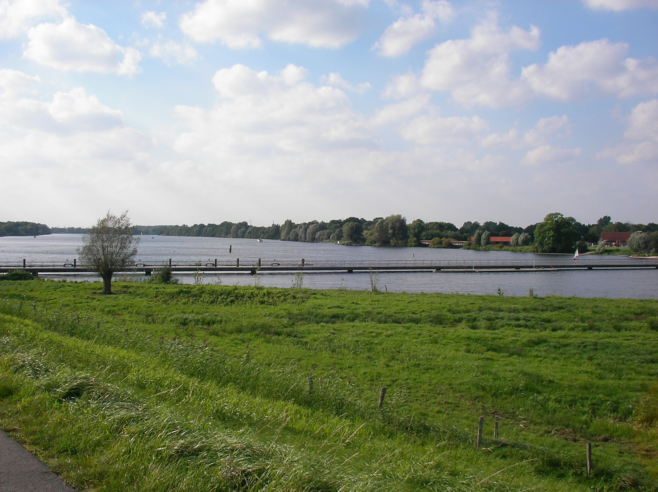 Hamburg-Reitbrook